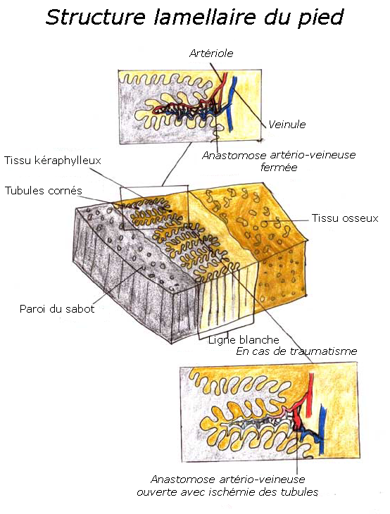 Schéma histologique du sabot et du tissu kéraphylleux du pied de cheval.